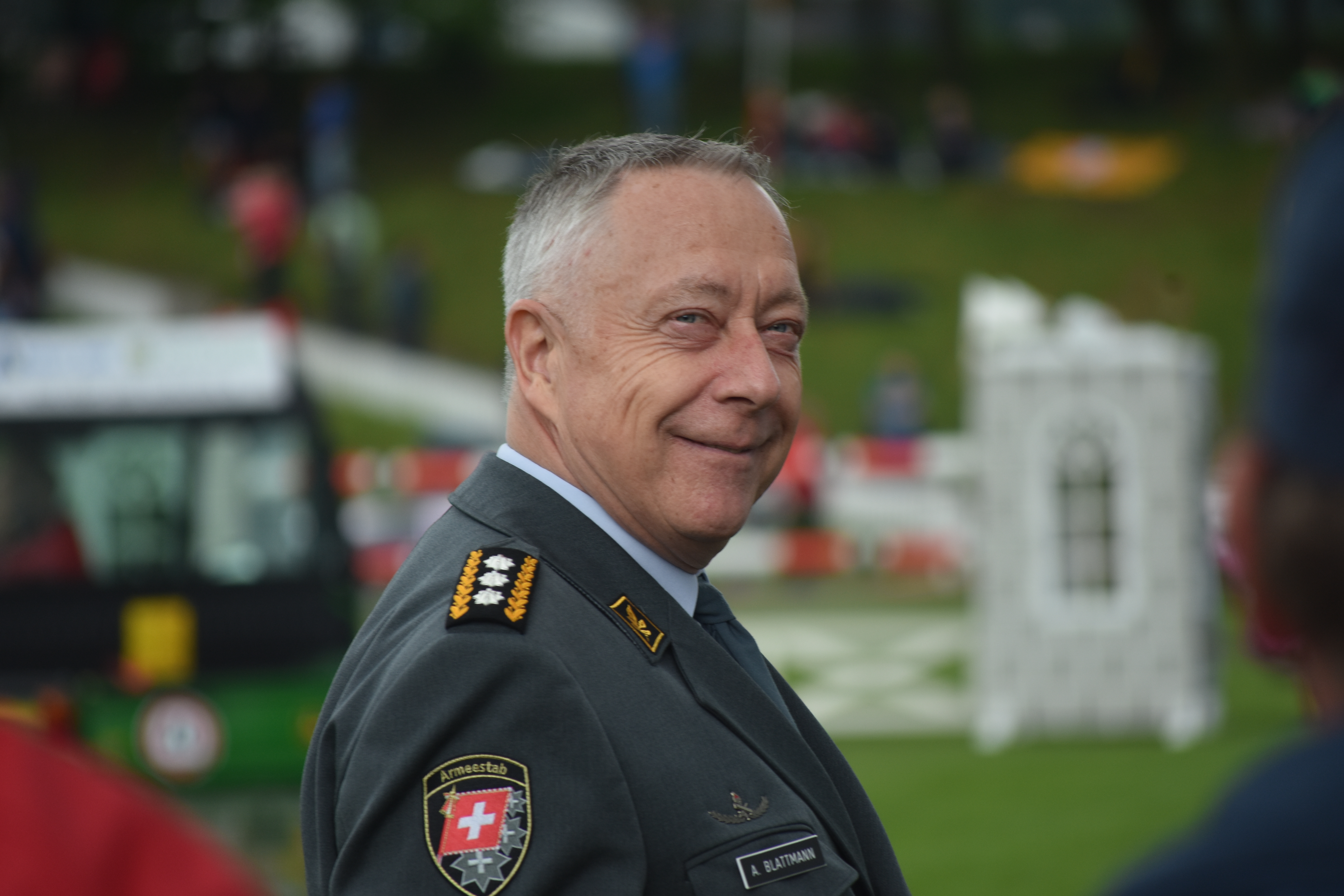 Kkdt André Blattmann am CSIO St. Gallen 2016